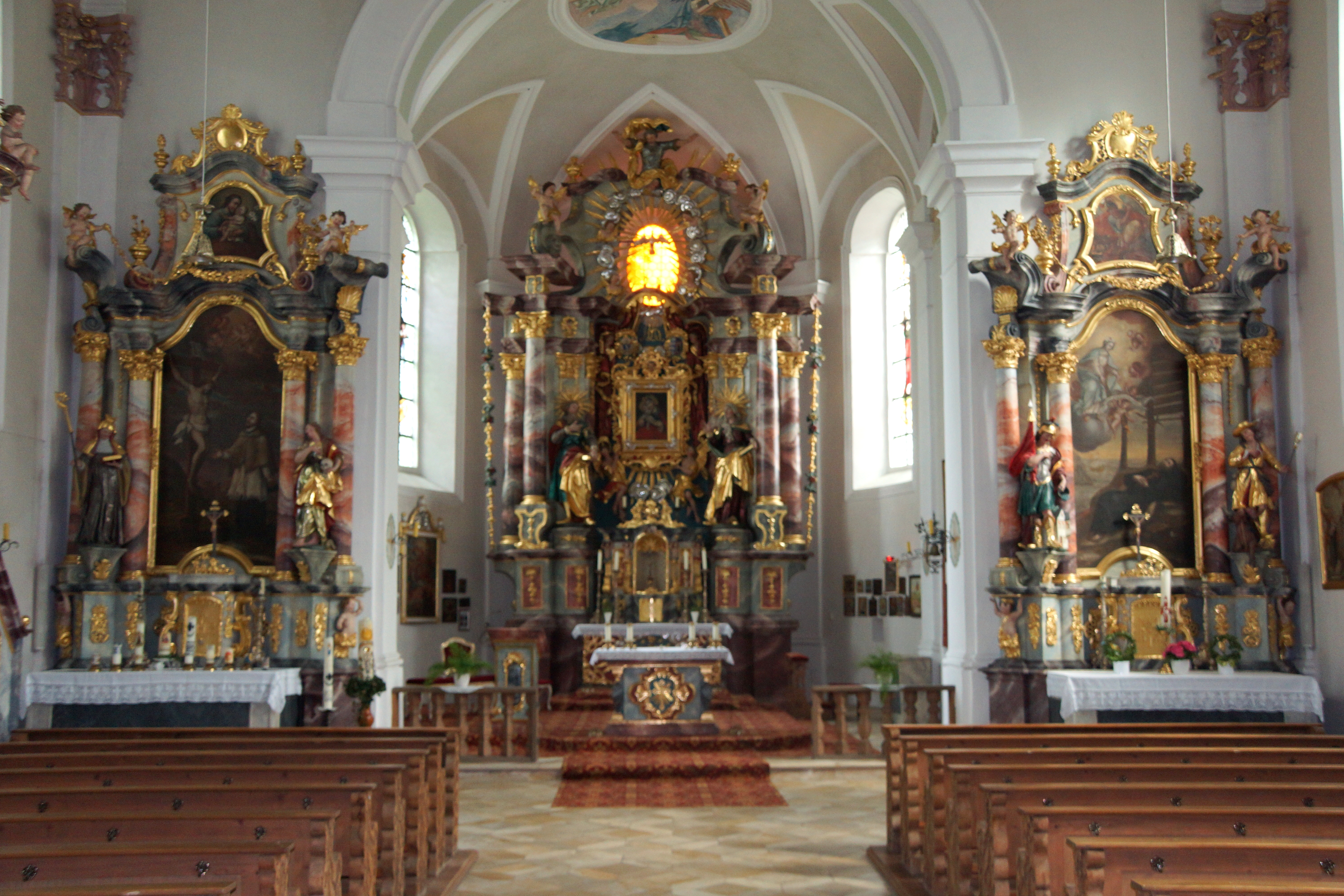 Die katholische Wallfahrtskirche Maria-Hilf im Oberpfälzischen Beratshausen